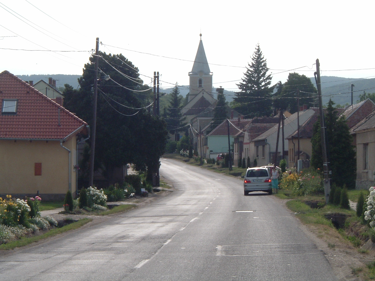 Kőszegszerdahely, Hungary